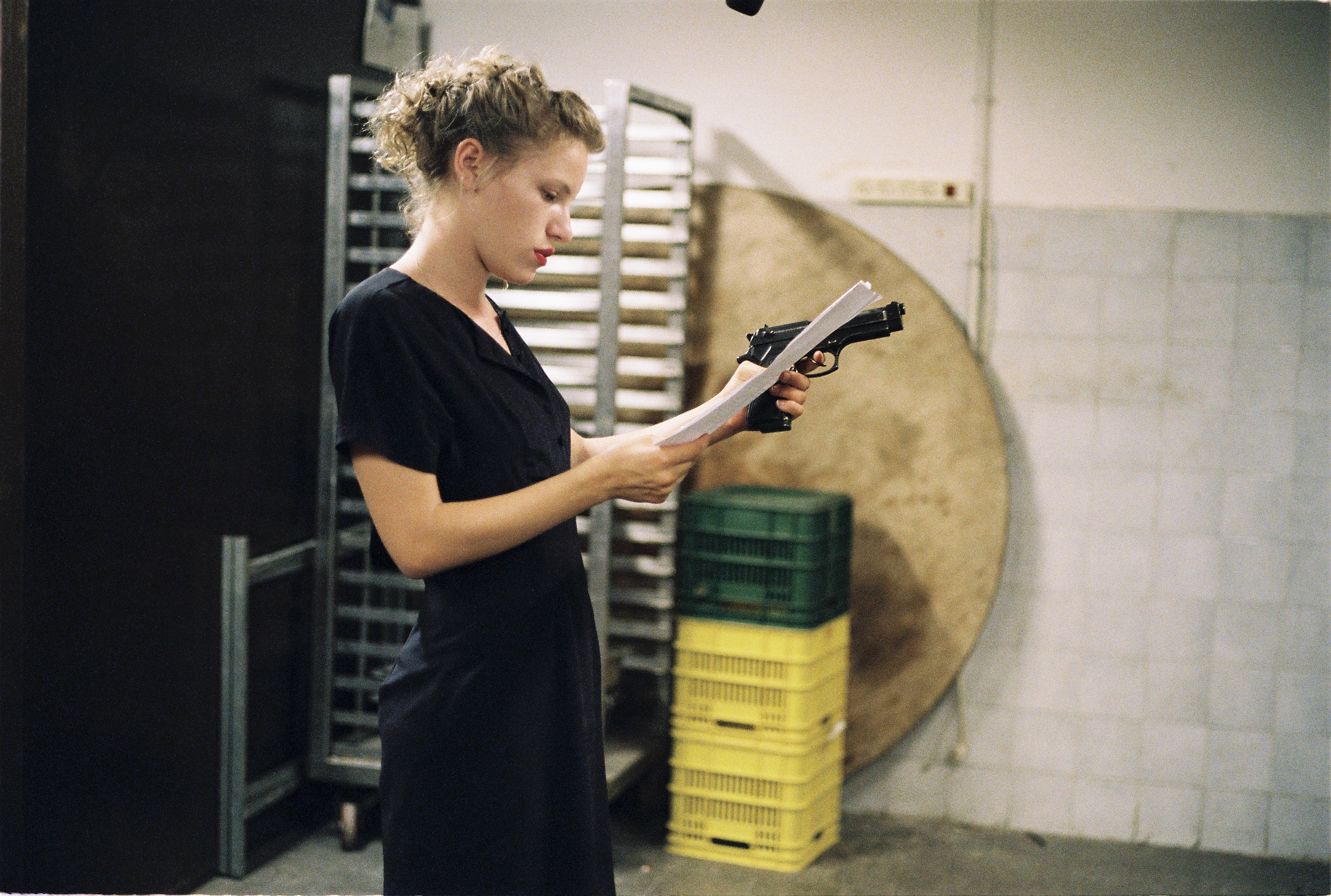 יערה פלציג